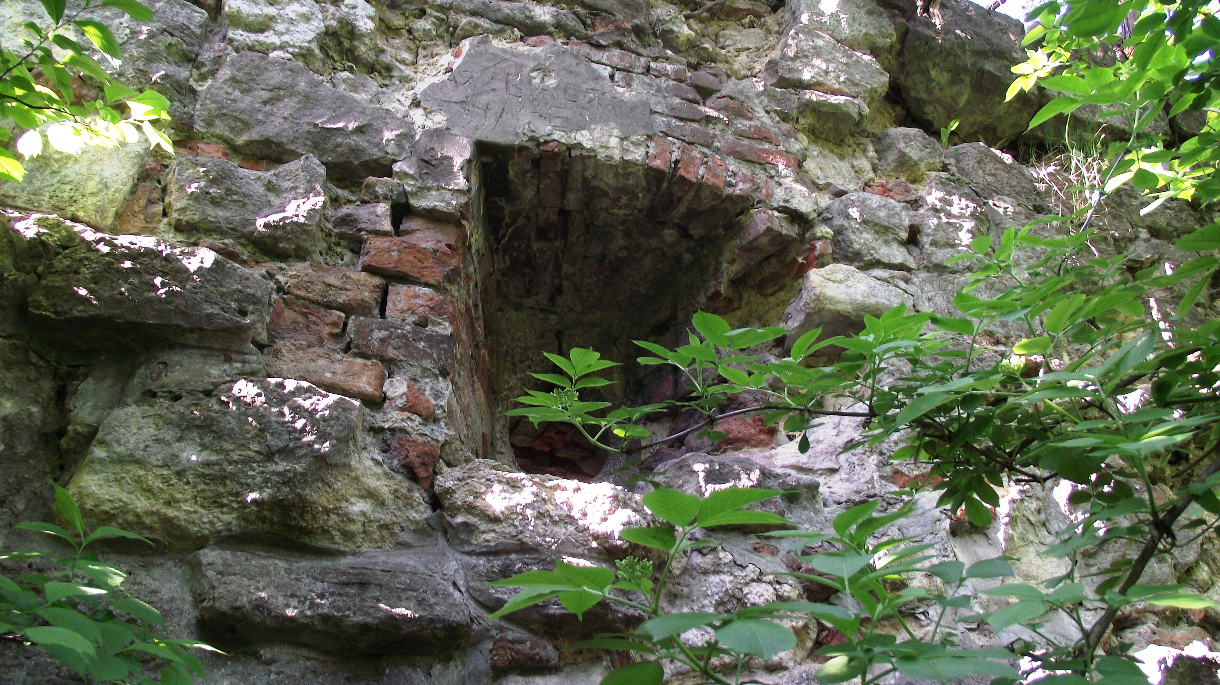 14-18 ст.